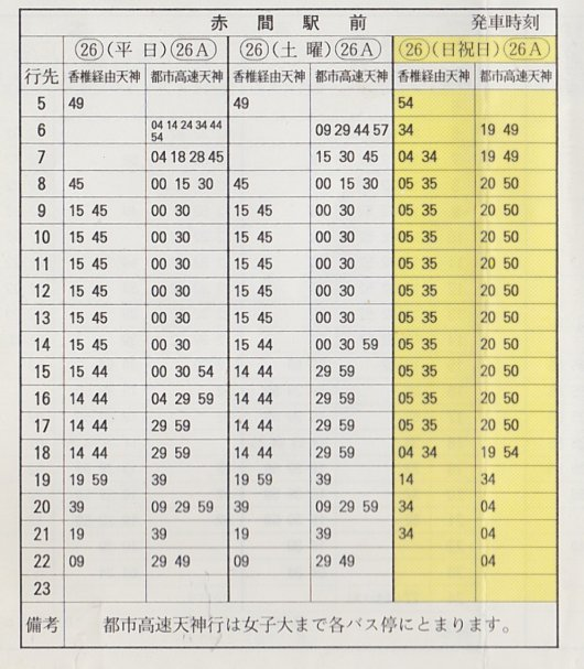 平成8年の赤間駅前時刻表です。26・26Aと40分ヘッドで交互に運行されていた。